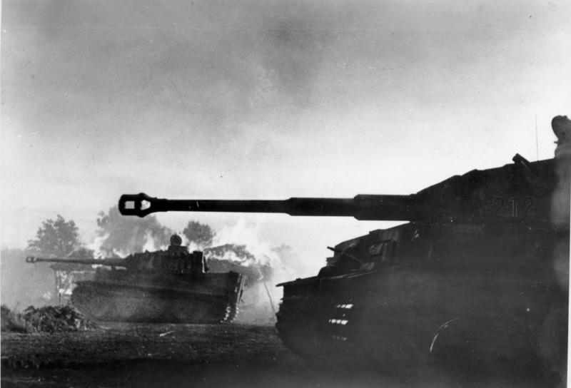 ADN-Bildarchiv, II. Weltkrieg 1939-1945 An der Front in der Sowjetunion: Mitte Juli 1943. Vorbei an brennenden Häusern einer Ortschaft setzen "Tiger"-Panzer der deutschen Wehrmacht während der schweren Kämpfe südlich Orel zu einem Gegenstoß an. Aufnahme: Henisch 3621-43